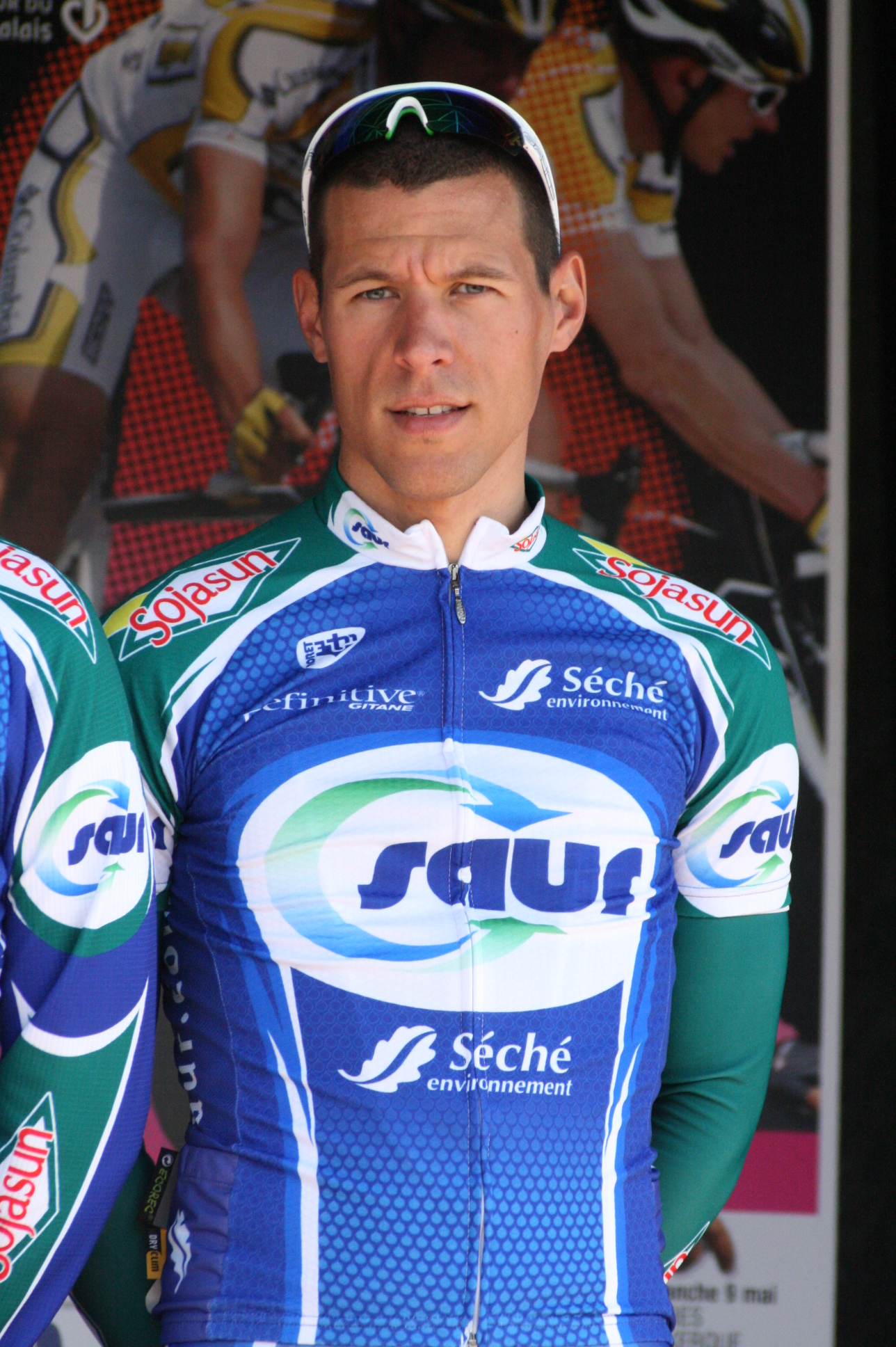 Stéphane Poulhies, lors de la présentation des équipes des 4 jours de Dunkerque 2010